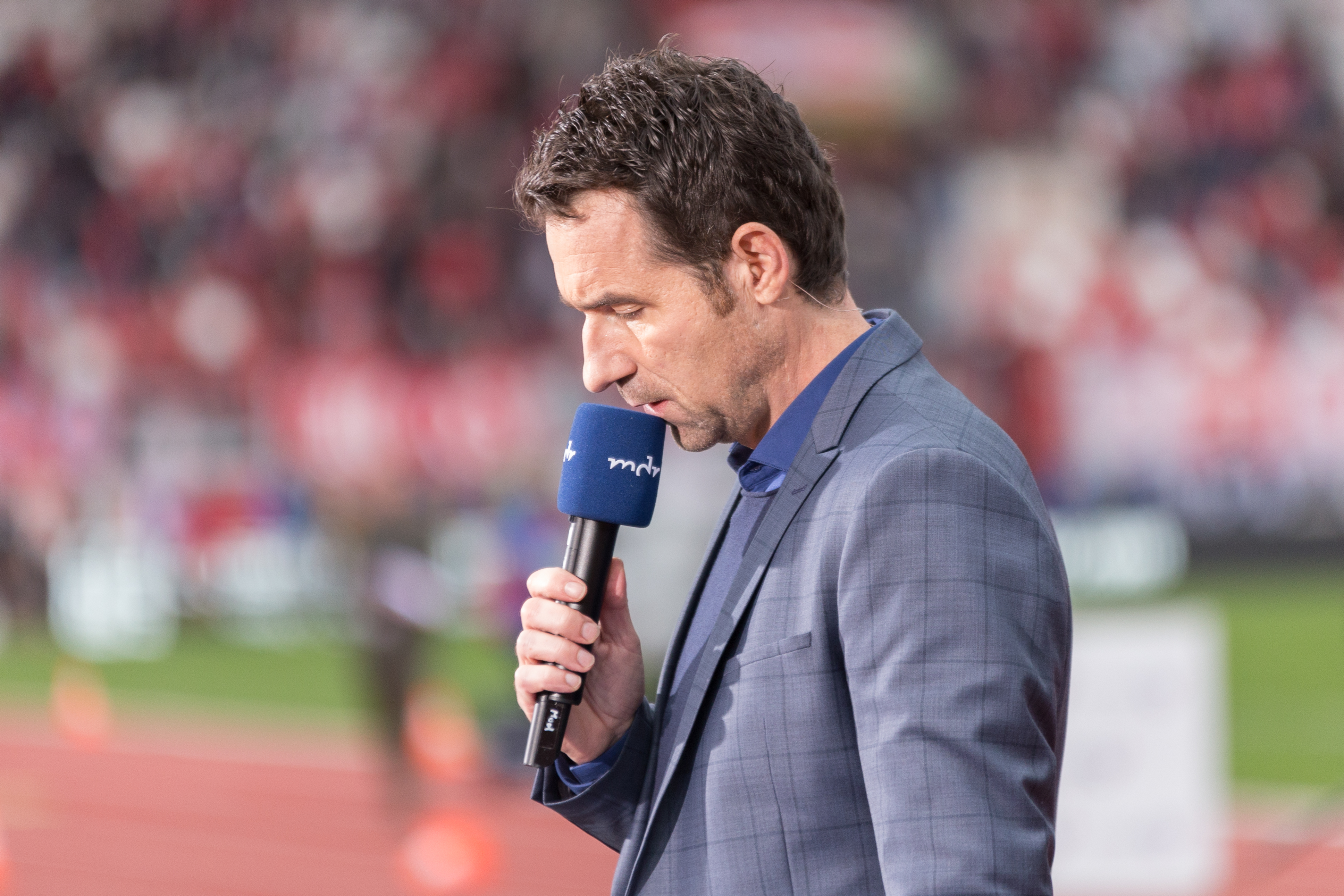 Tom Scheunemann bei der Moderation eines Fußballspiels